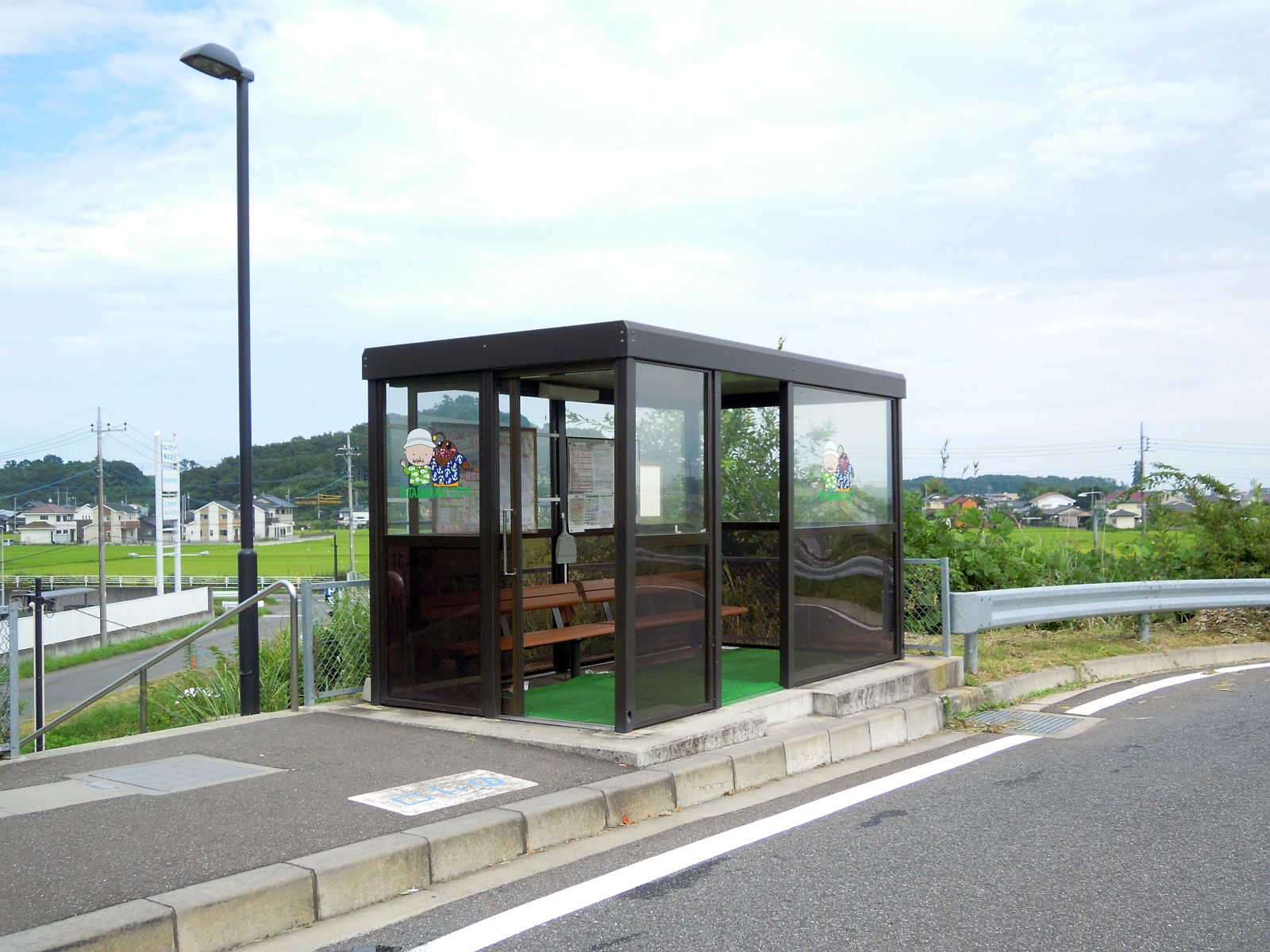 茨城県北茨城市の常磐自動車道北茨城インターチェンジの料金所外側に位置する北茨城インターバス停。